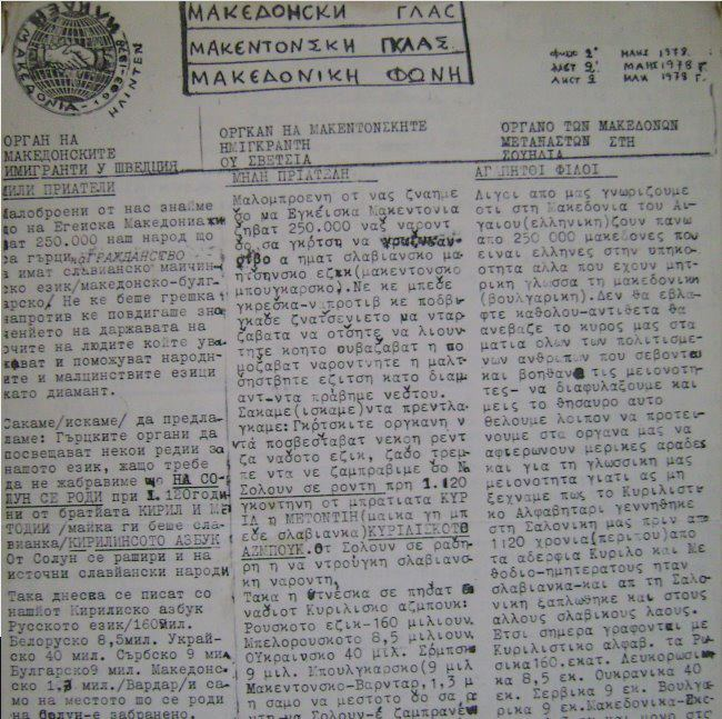 Македонски глас